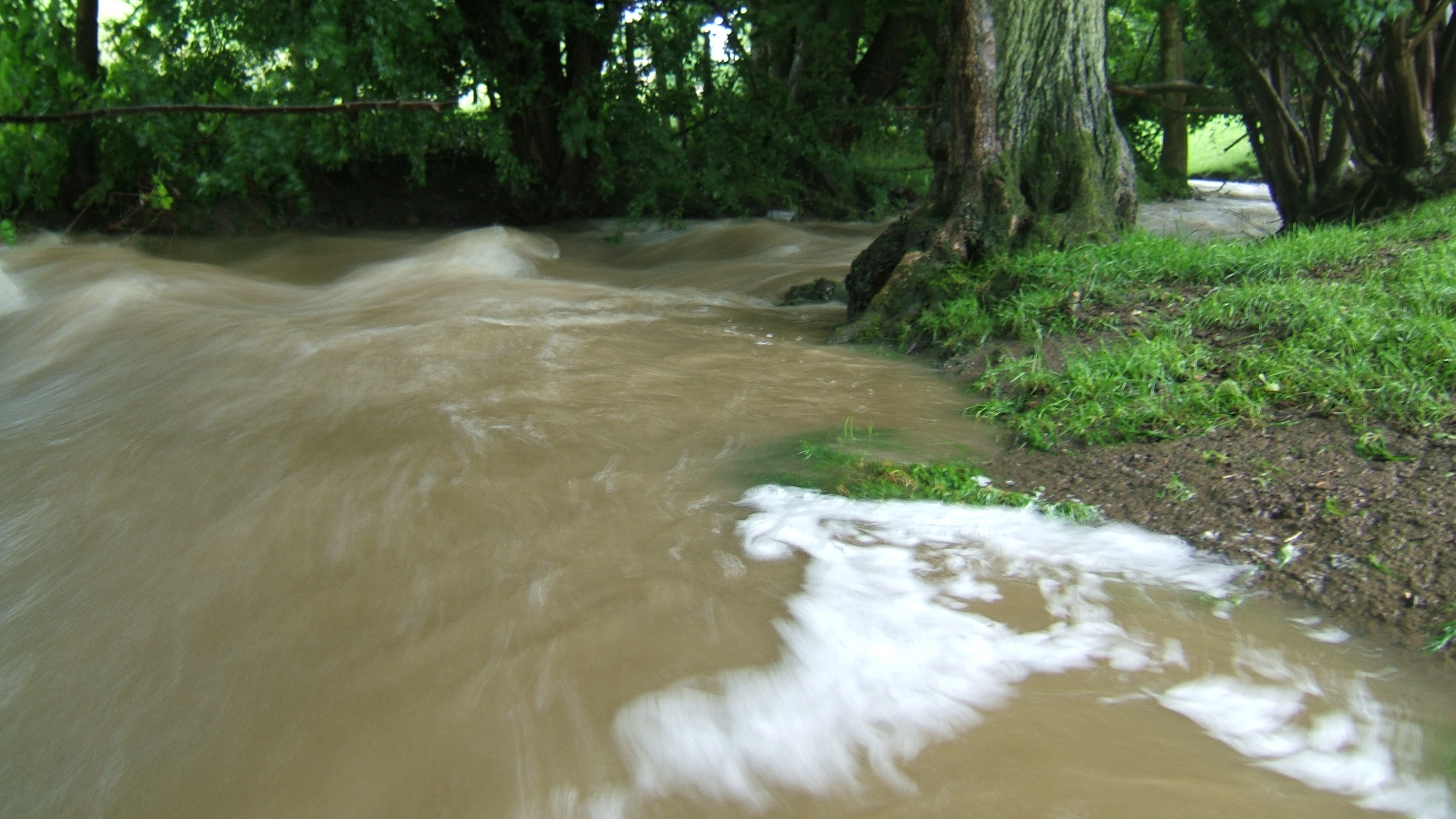 Afon Hesbin yn llifo rhwng Rhyd-y-Marchogion a Rhydymeudwy ar 25ain Mehefin, 2007, wedi glaw trwm.